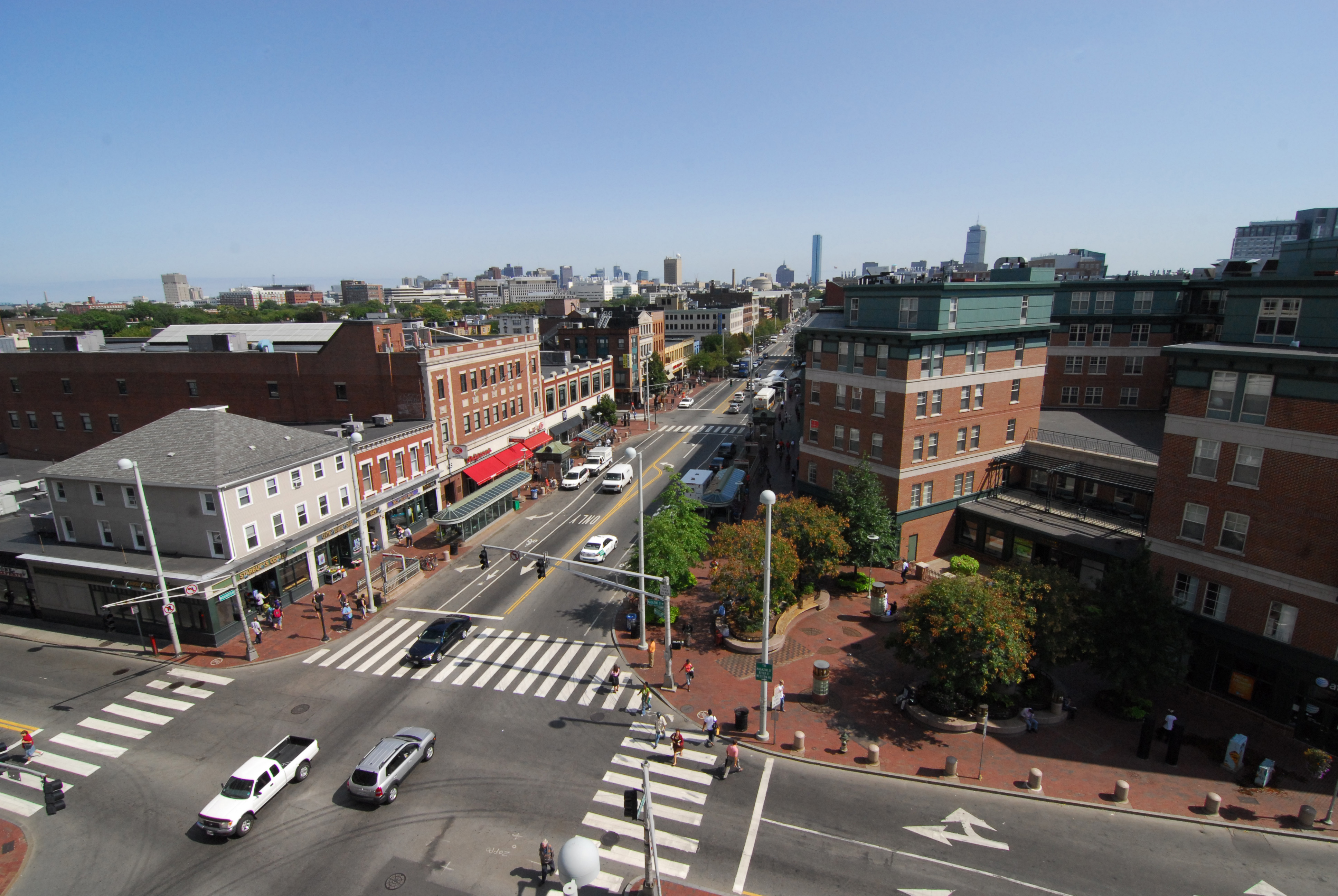 Central Square, Cambridge from above